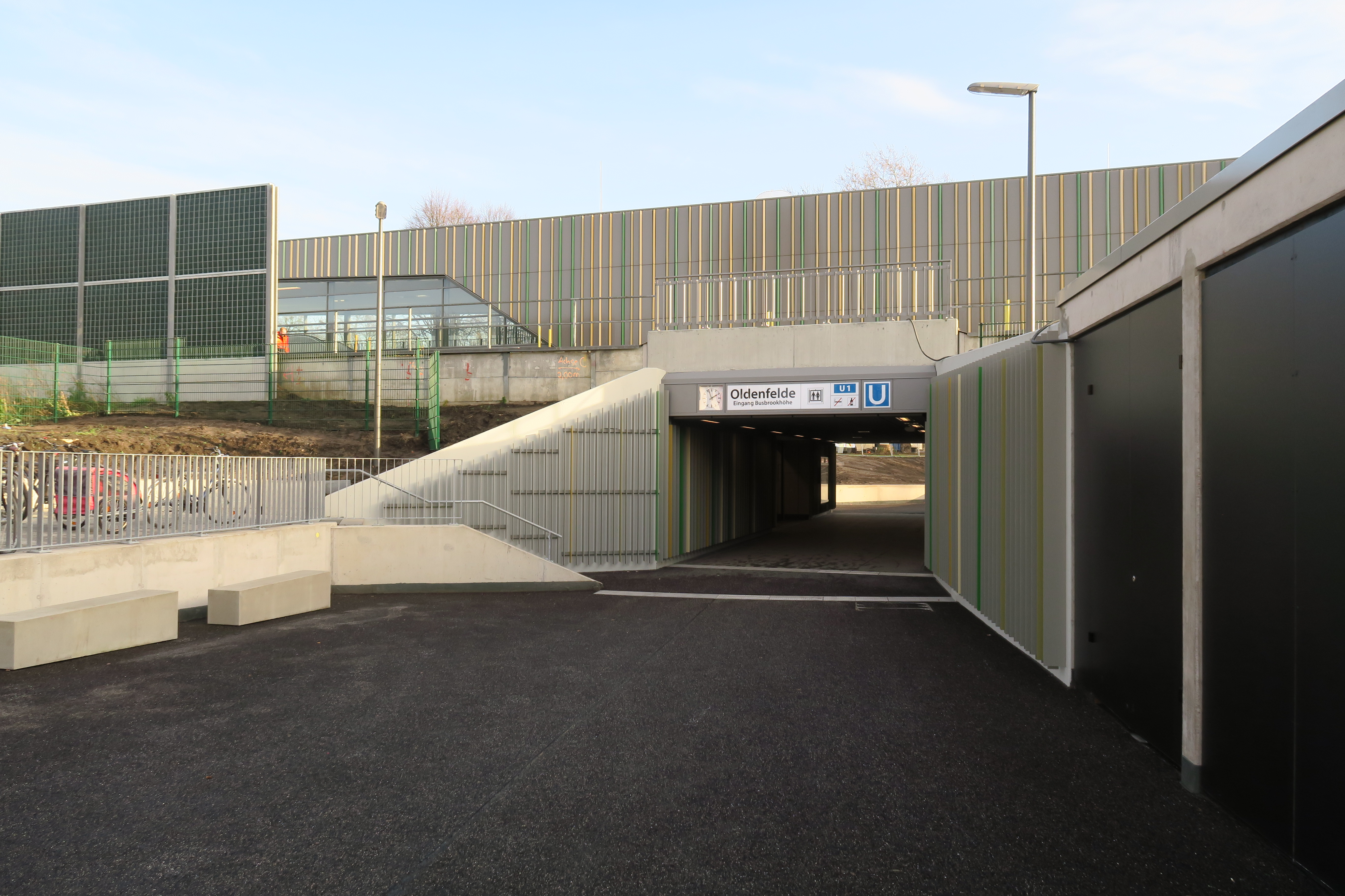 Eingang Busbrookhöhe des U-Bahnhofs Oldenfelde in Hamburg